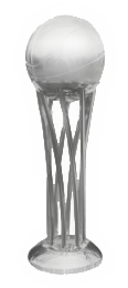 Trofeo de la Copa del Rey de Baloncesto - España.